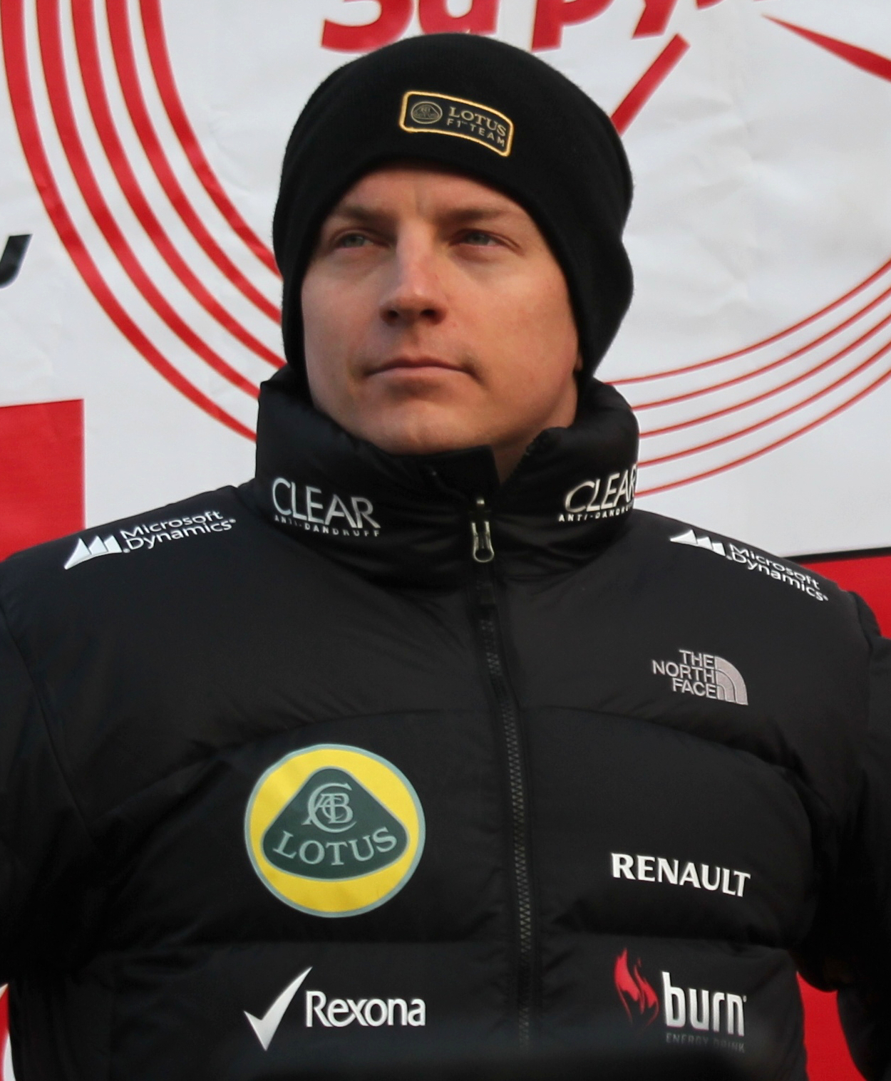 Русиньскый: Кими Райкконен на Гонке Звёзд "За рулём" Москва 23.02.2013